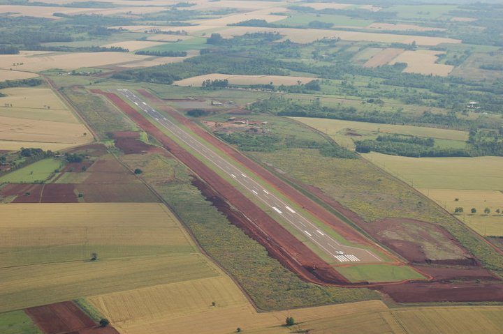 Vista aérea de la pista de aterrizaje, Aeropuerto de la Ciudad de Encarnación